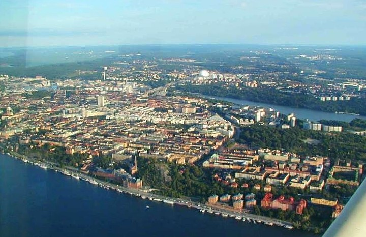 Mittersta Södermalm från luften 2001. Fotograf: Användare:Supernissen